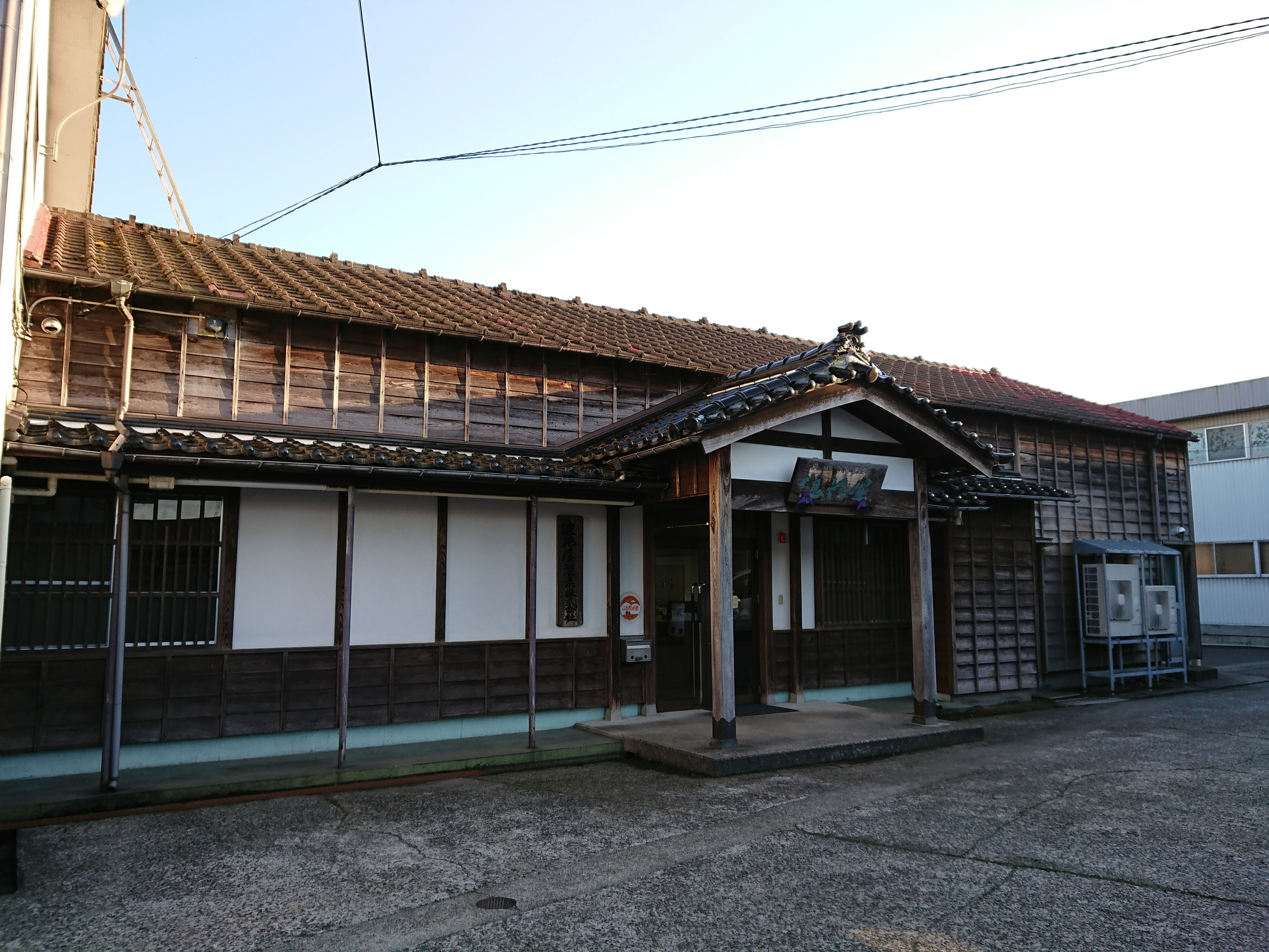 浪花屋製菓の本社外観